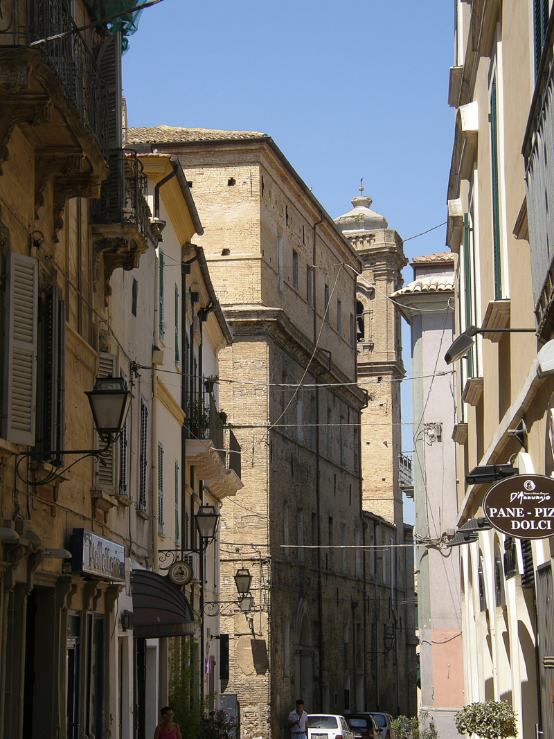 Vasto